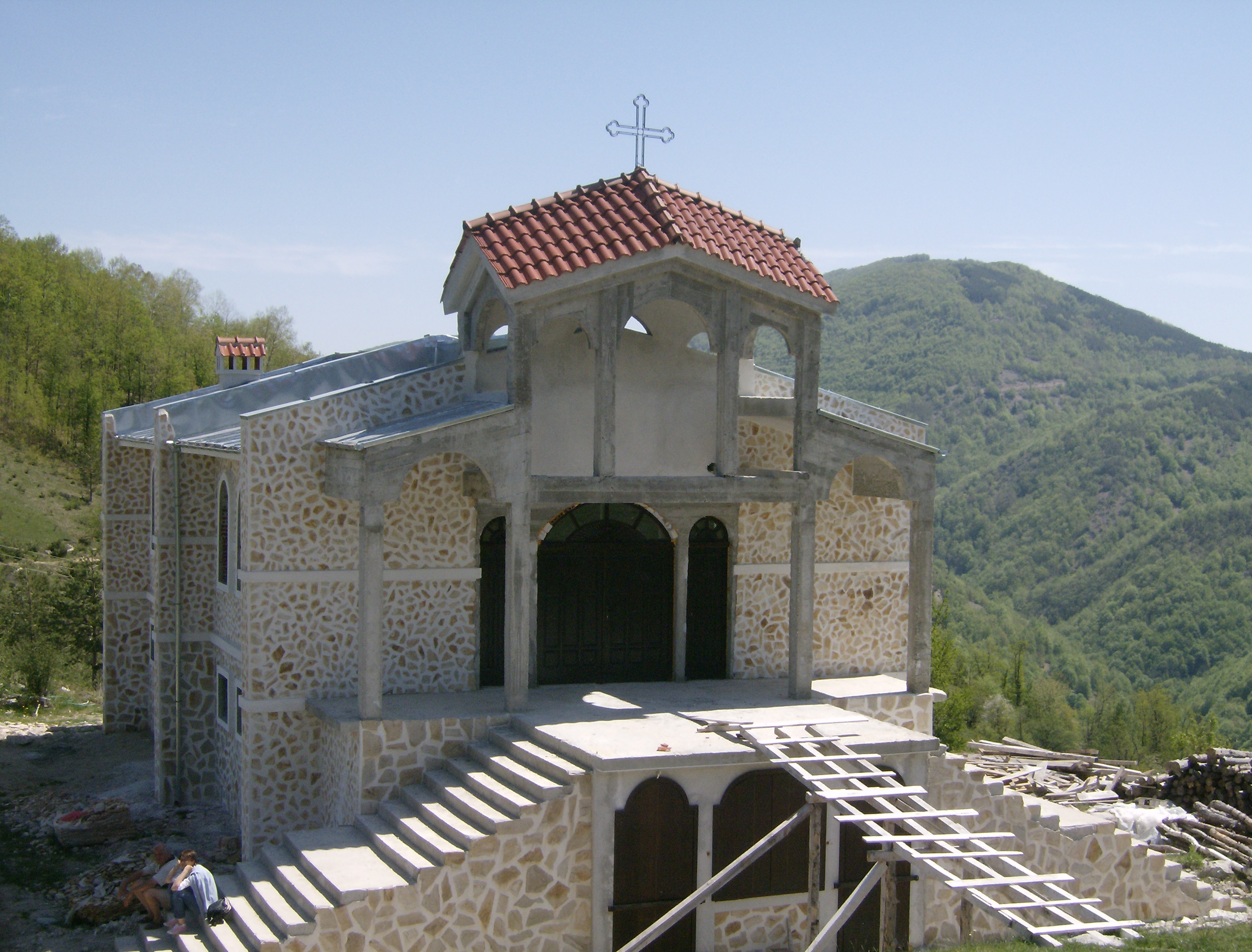 Новостроящата се църква преди последните няколкостотин метра от Белинташ